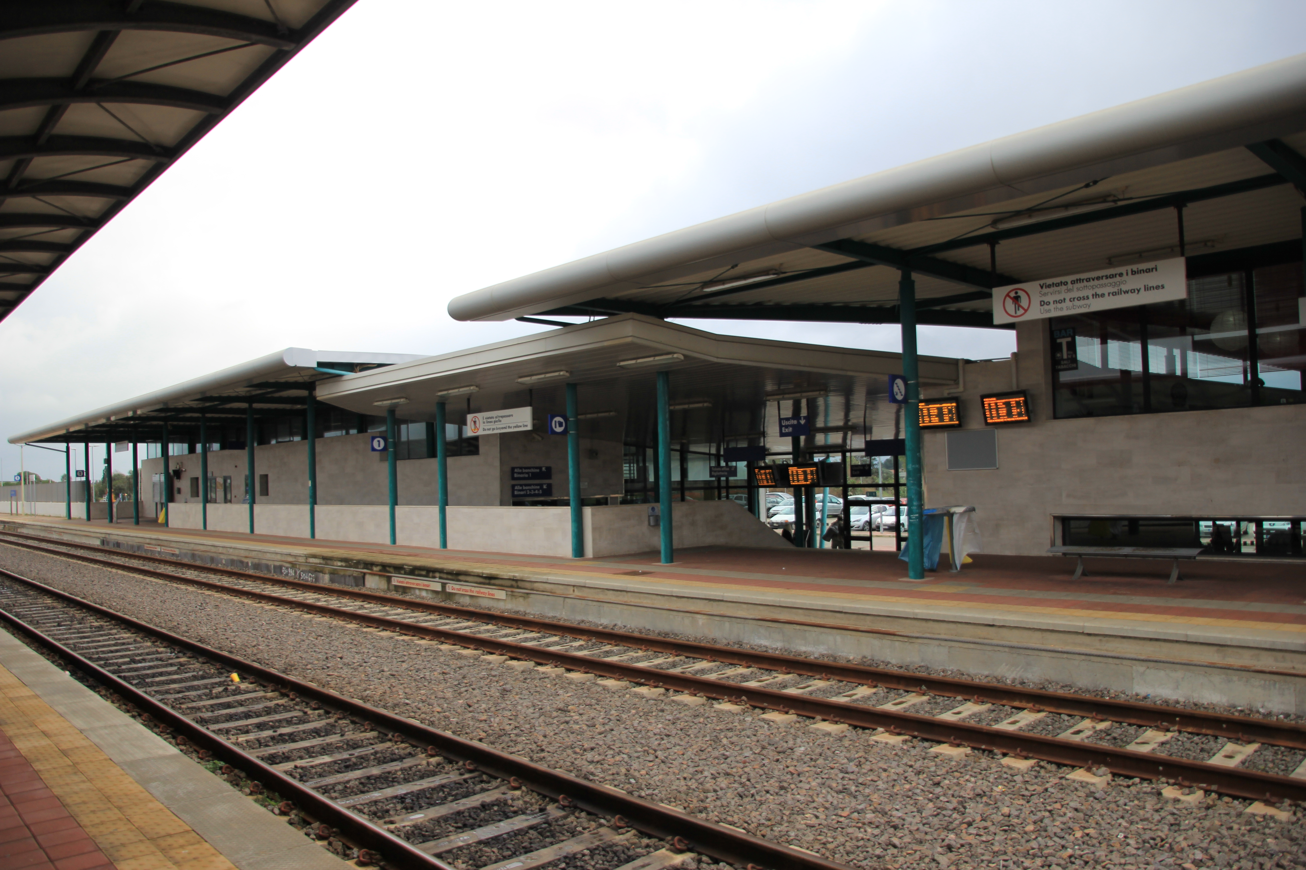 San Gavino Monreale - Stazione ferroviaria